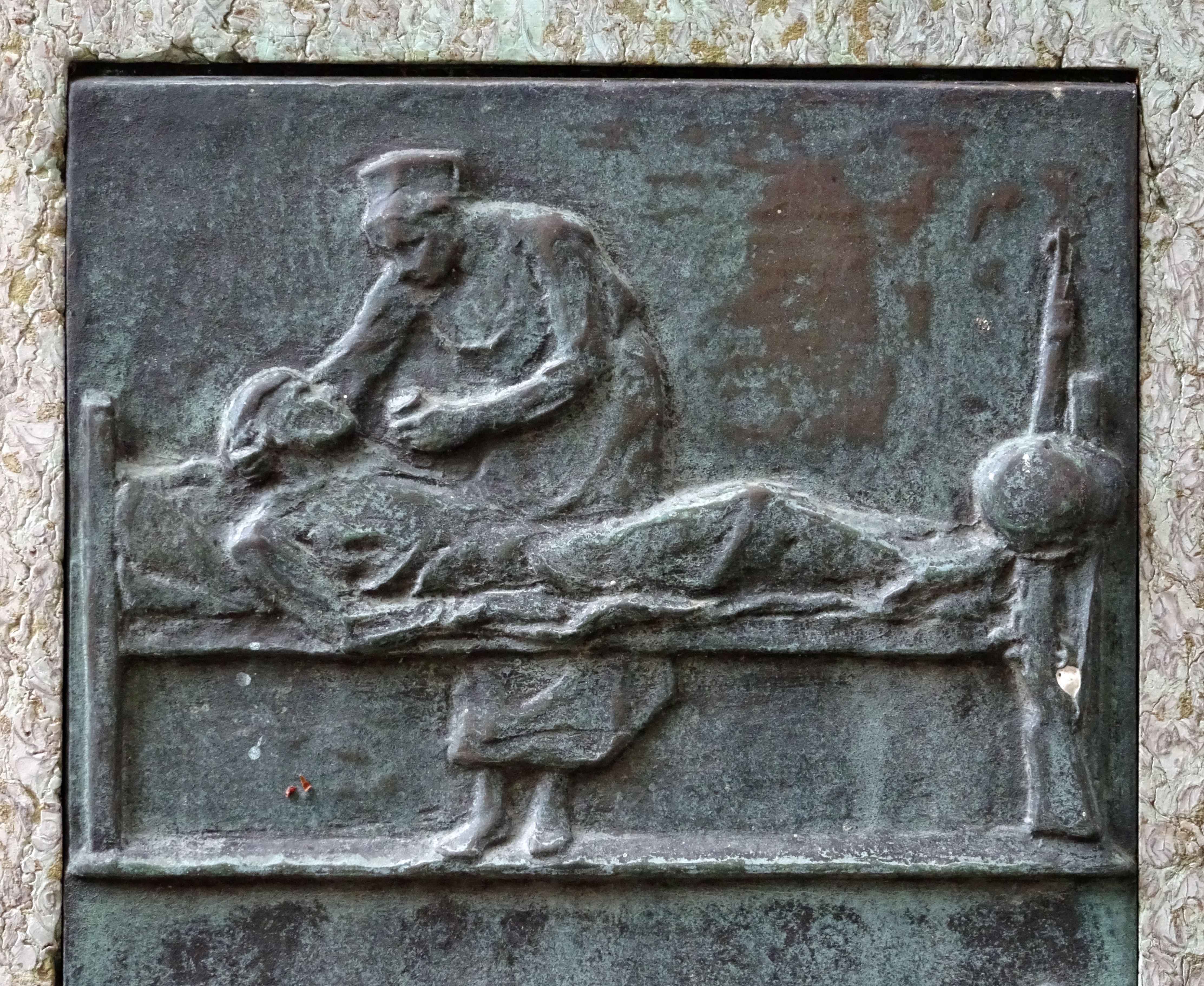 Kriegerdenkmal (1. WK) im Garten des Gebäudes Reinhäuser Landstr. 26, Göttingen, ehemalige Werner-Schule vom Deutschen Roten Kreuz, Detail zeigt das Relief: Schwester gibt einem verwundeten Soldaten zu trinken.